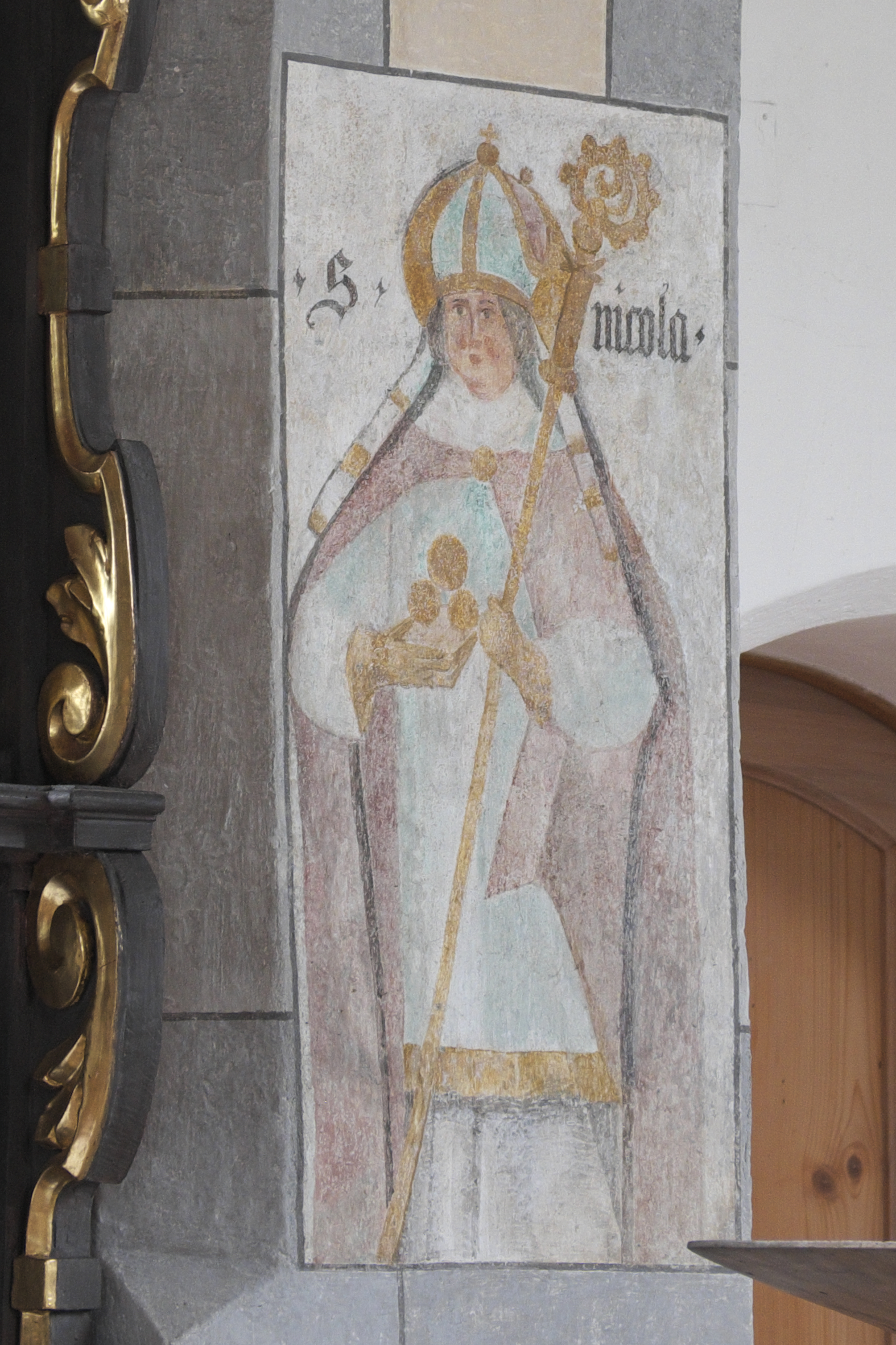 Katholische Filialkirche St. Nikolaus in Oberkirch (Füssen) im Landkreis Ostallgäu (Bayern/Deutschland), Wandmalerei am Chorbogen aus der zweiten Hälfte des 15. Jahrhunderts, Darstellung: heiliger Nikolaus